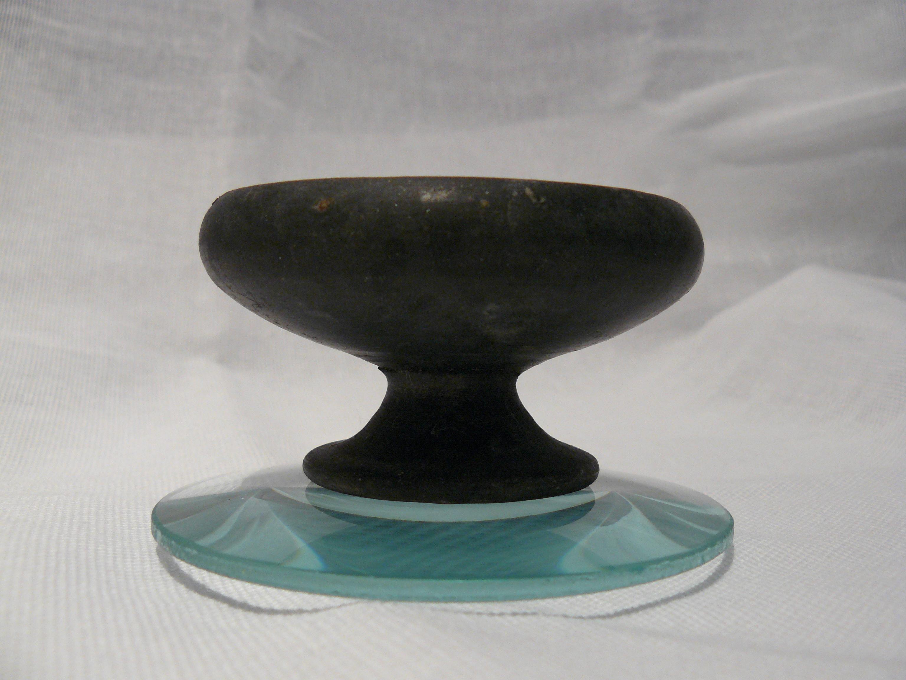 Copa etrusca de ceràmica de bucchero nero, tipus transicional, amb peu alt còncau i llavis entrant. Segle VI aC.